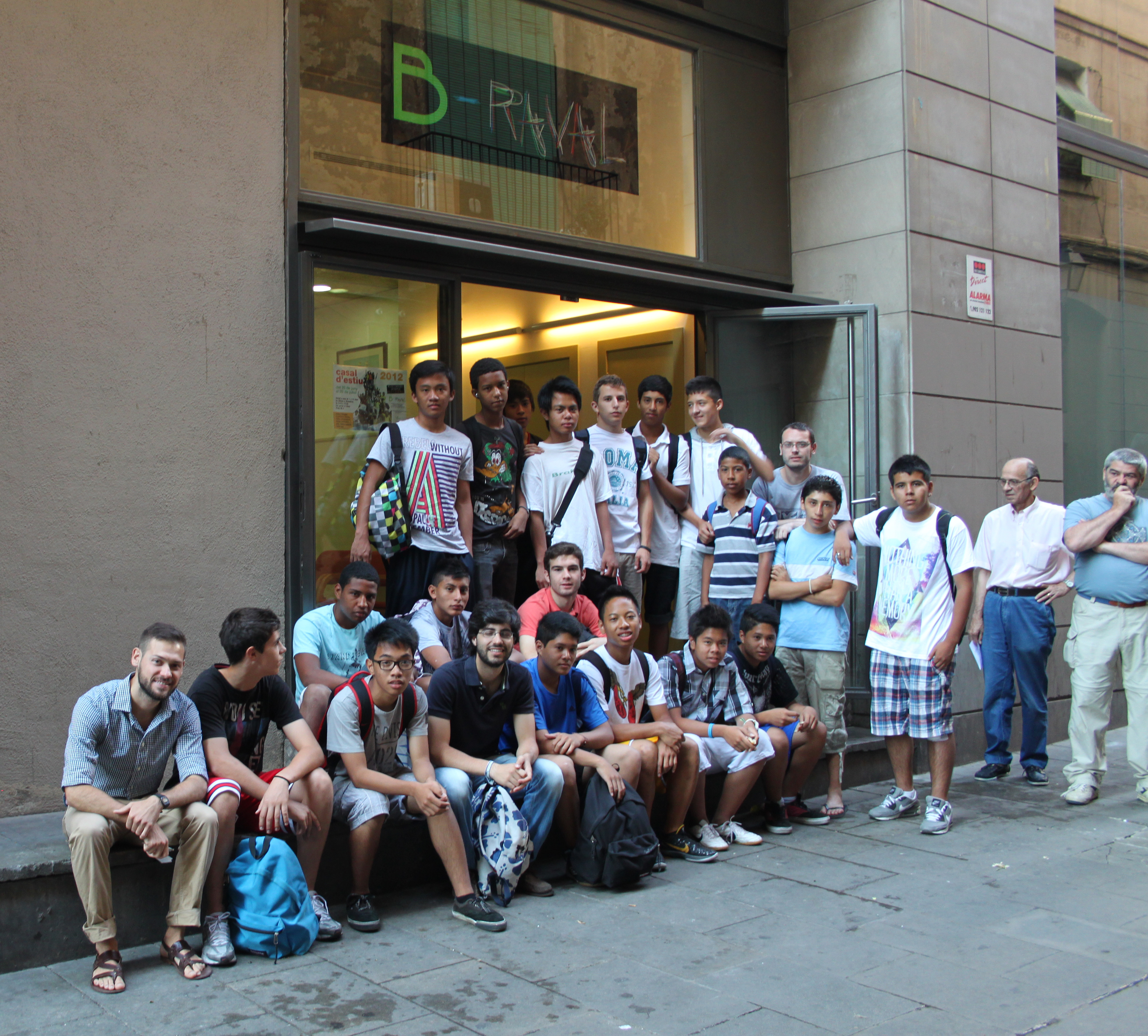 Un grup de joves al davant del Braval, un centre d'activitats que a través del voluntariat ofereix suport socioeducatiu als joves del Raval de Barcelona. La foto està presa el 2013.